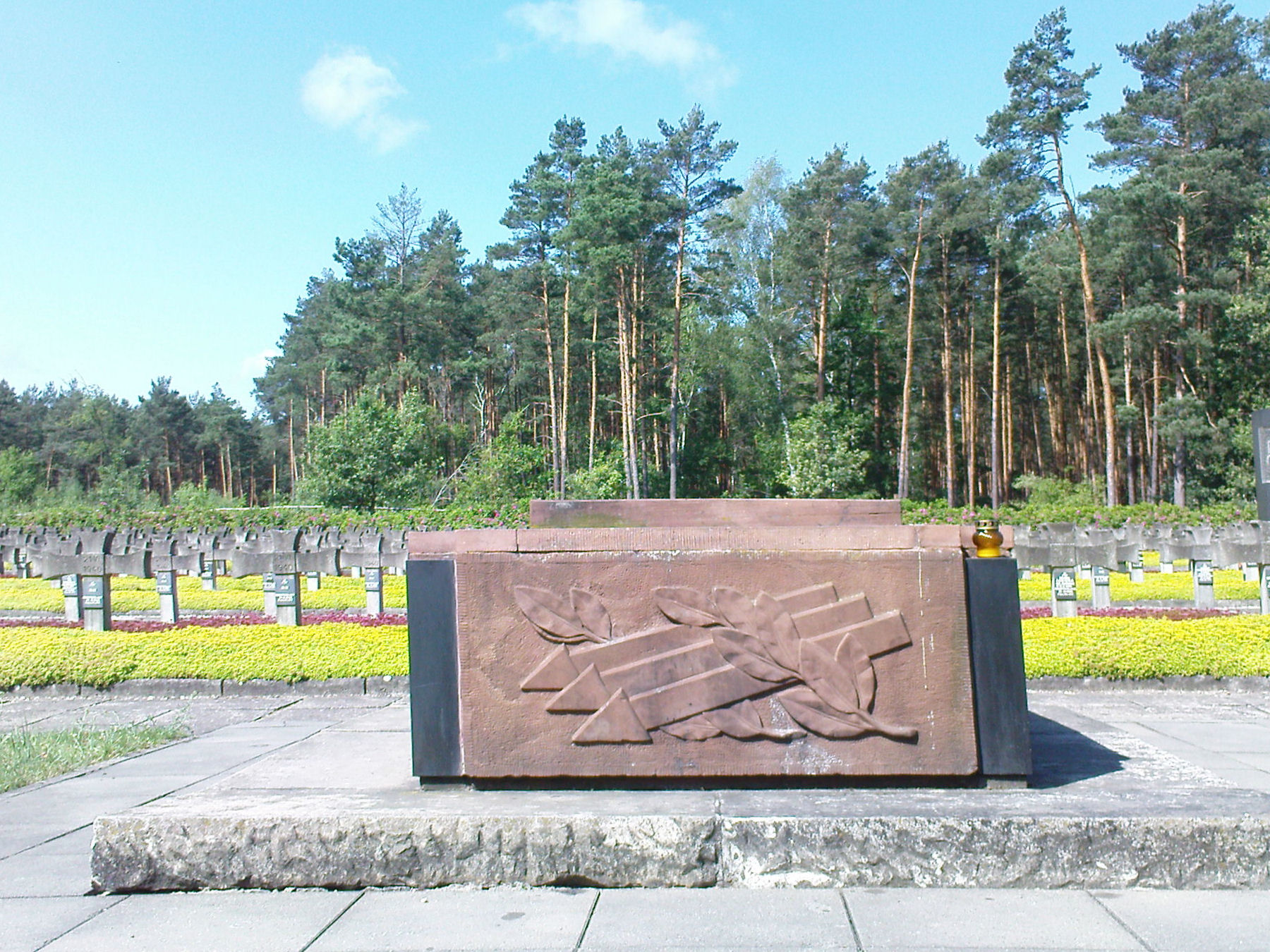 Cmentarz Wojenny Palmiry - mogiła Mieczysława Niedziałkowskiego